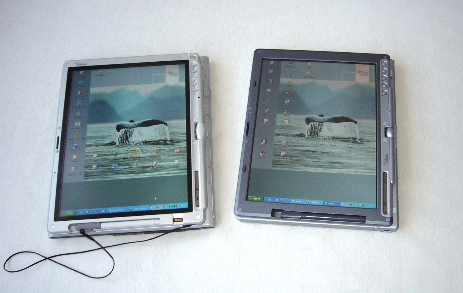 Fujitsu Siemens Lifebook T4210 and Lifebook T3010 Tablet PCs